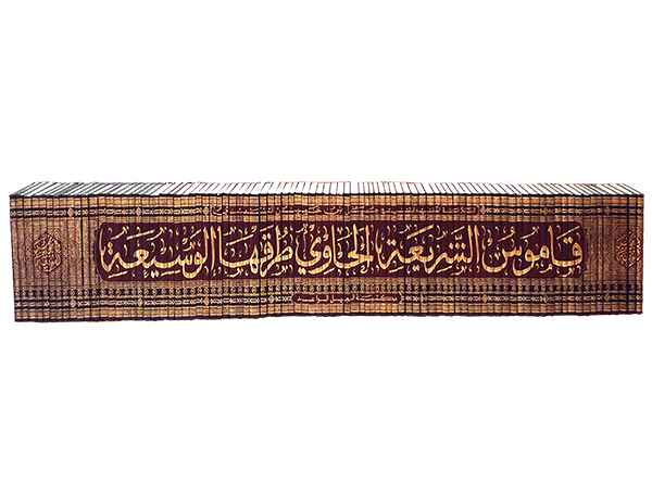 من أثمن الكتب